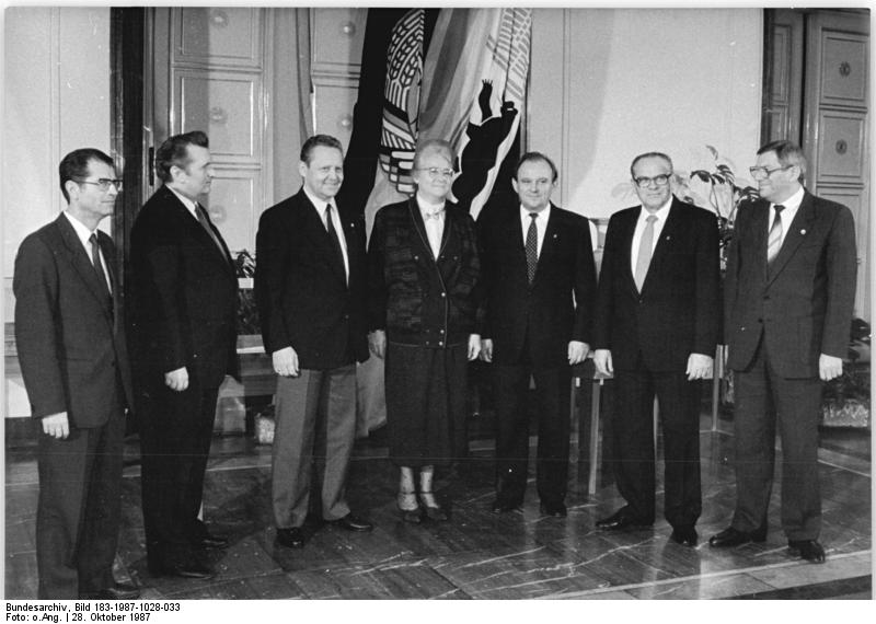 ADN-ZB/Zimmermann/28.10.87/Berlin: Jubiläum/ Auf den Tag genau 750 Jahre nach der ersten urkundlichen Erwähnung Berlins trafen Günter Schabowski, Mitglied des Politbüros und Sekretär des ZK der SED, 1. Sekretär der Bezirksleitung Berlin der SED (3.v.l.), und Berlins Oberbürgermeister Erhard Krack (3.v.r.) mit den Berliner Bezirksvorsitzenden der Blockparteien im Roten Rathaus zusammen. V.l.n.r. Fritz Krausch (LDPD), Prof. Dr. ec. Dietrich Voigtberger (CDU), Günter Schabowski, Prof. Anita Weißbach-Rieger (Bezirksvorsitzende der Nationalen Front), Erhard Krack, Wilhelm Weißgärber (DBD) und Gustav-Adolf Schlomann (NDPD).